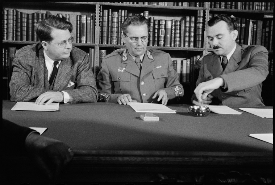 Српски (ћирилица): др Никола Петровић (Нови Сад, 31. март 1910 — Београд, Србија, 1997), машински инжењер, учесник Народноослободилачке борбе и научни сарадник Историјског института Српске академије наука и уметности.